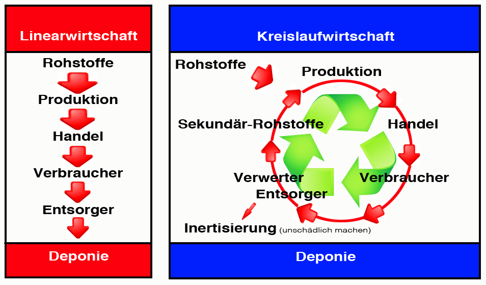 Vergleich der Produktionsketten Linear- und Kreislaufwirtschaft.